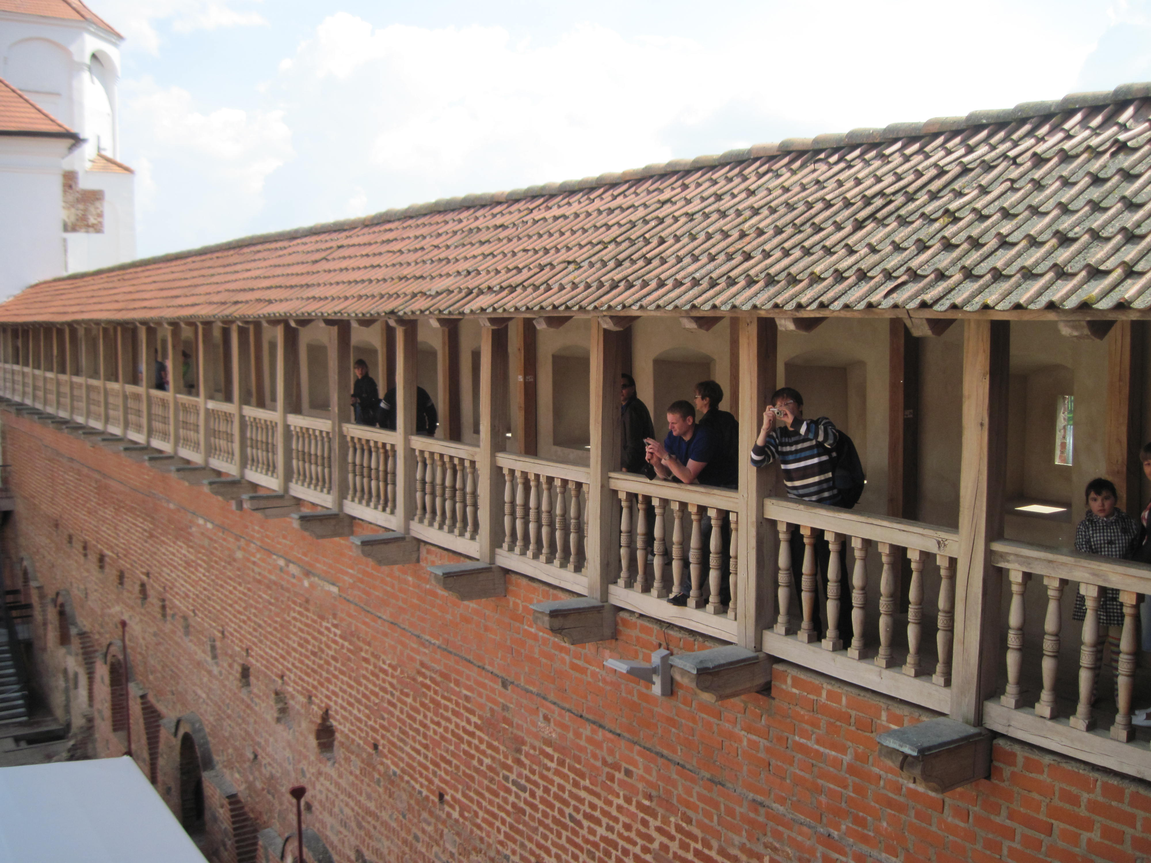 Паўночная галерэя Мірскага замка